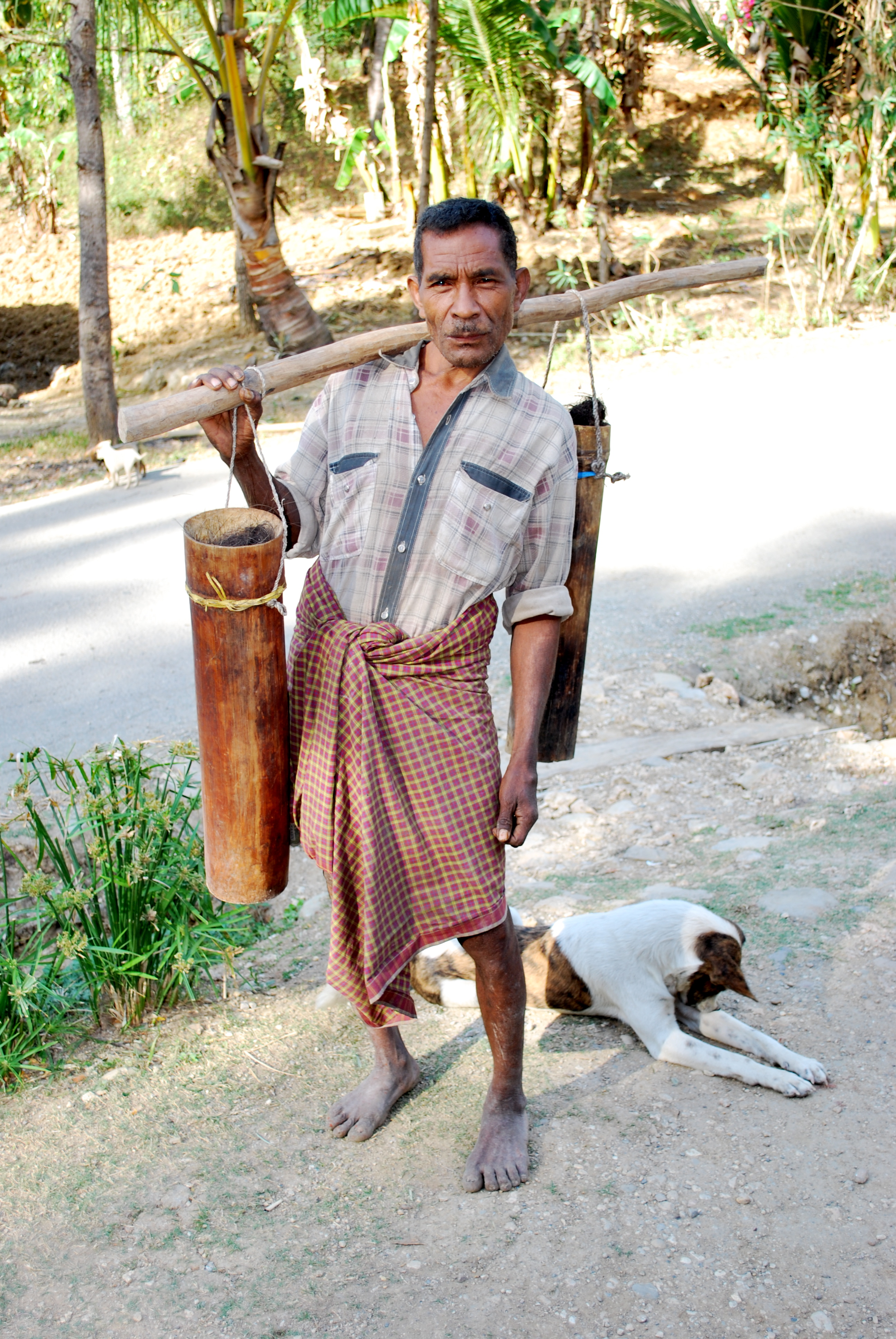 Wasserträger in Venilale